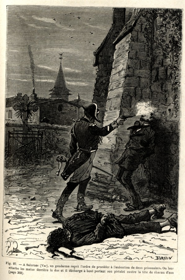 Exécution de deux prisonniers à Salernes dans le Var, gravure illustrant le tome Ier de l'ouvrage de Taxile Delord, Histoire illustrée du Second Empire, Paris, imprimerie G. Baillière, 1880, p. 369 ([1]).